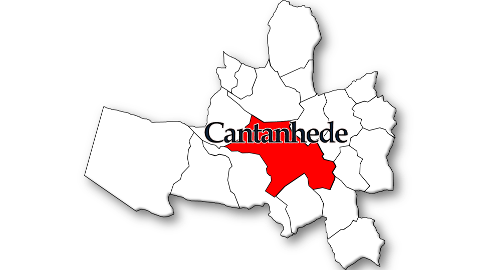 Português